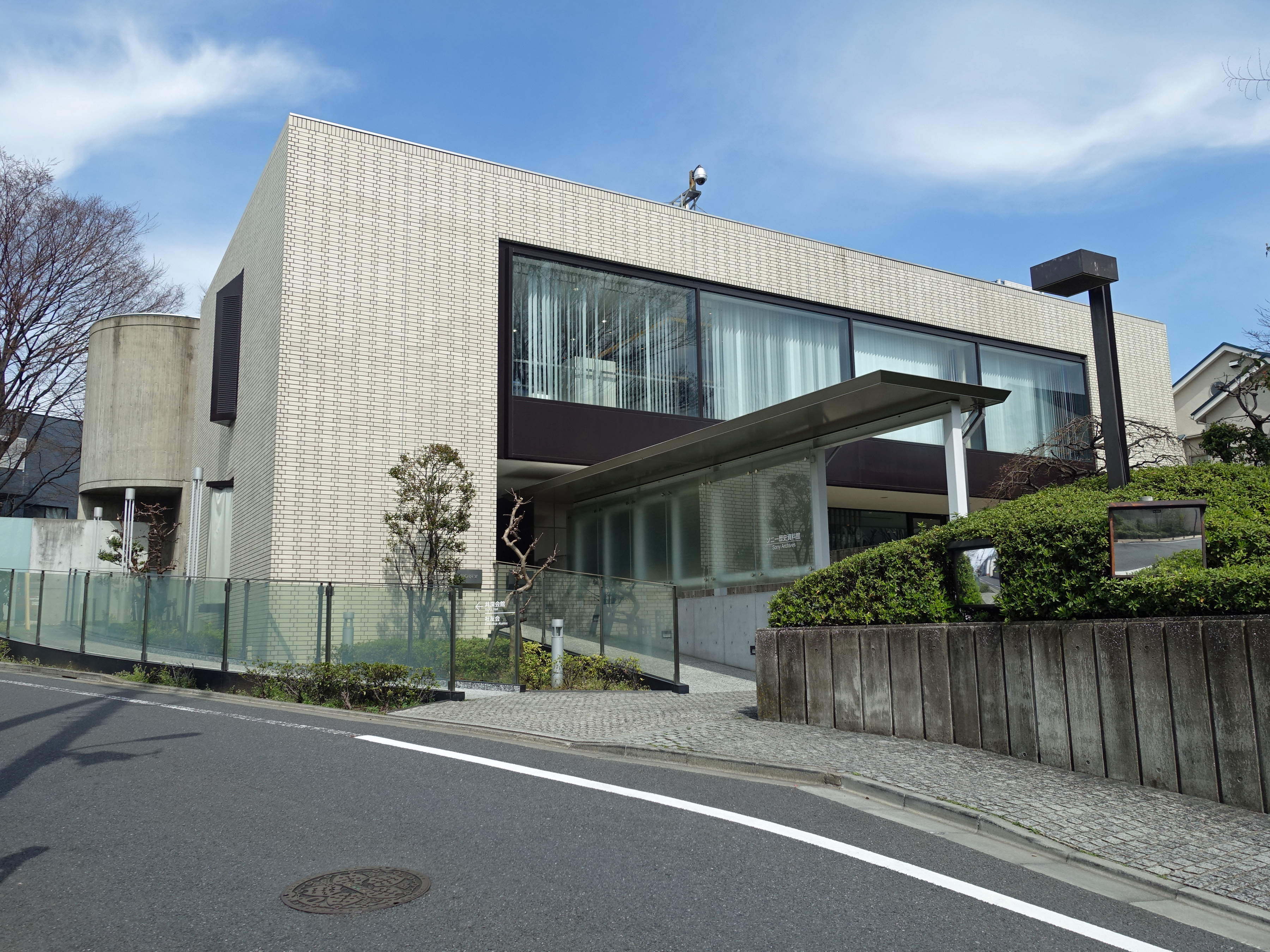 御殿山に残るソニー歴史資料館外観